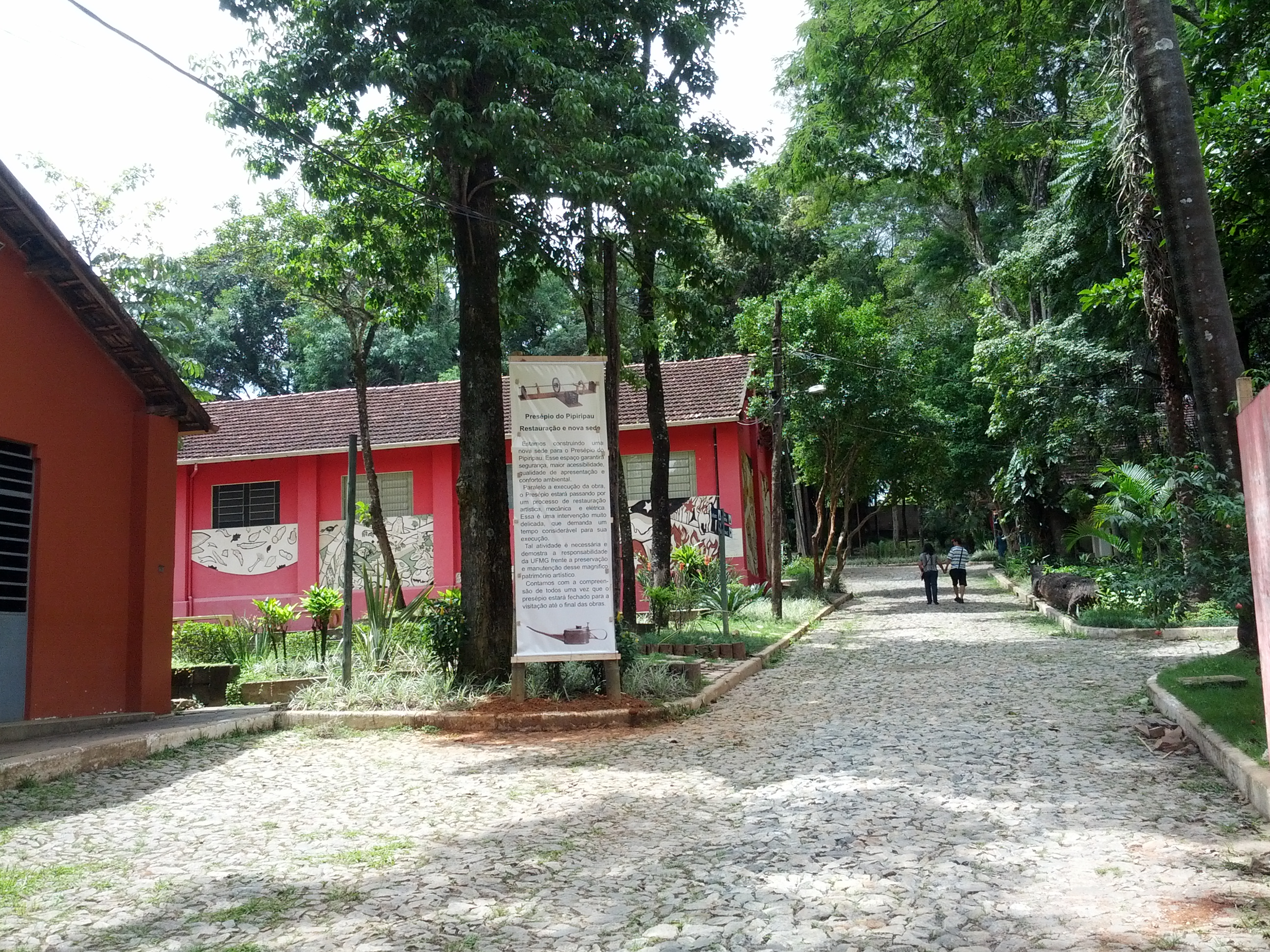 Rua no Jardim Botânico da UFMG.